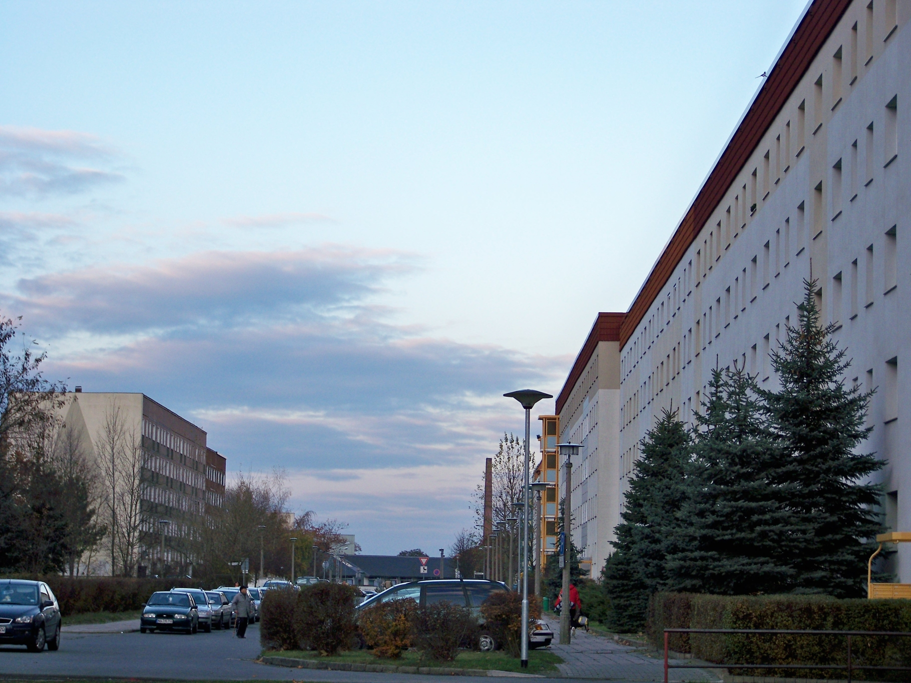 sanierter Plattenbau in Weißwasser/Oberlausitz, Heinrich-Hertz-Straße